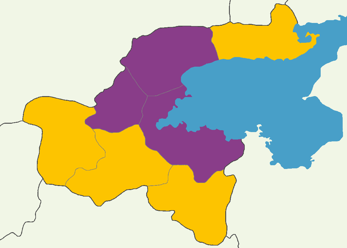 Bitlis'te 2014 Türkiye cumhurbaşkanlığı seçimi sonuçları